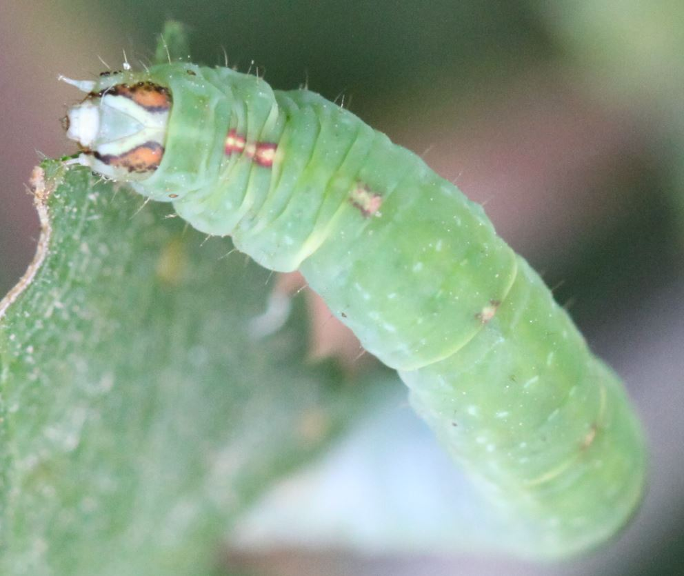 Raupe des Schattenbinden-Weißspanners (Lomographa temerata) am 17.9.2016 am Rheinufer südlich von Mannheim